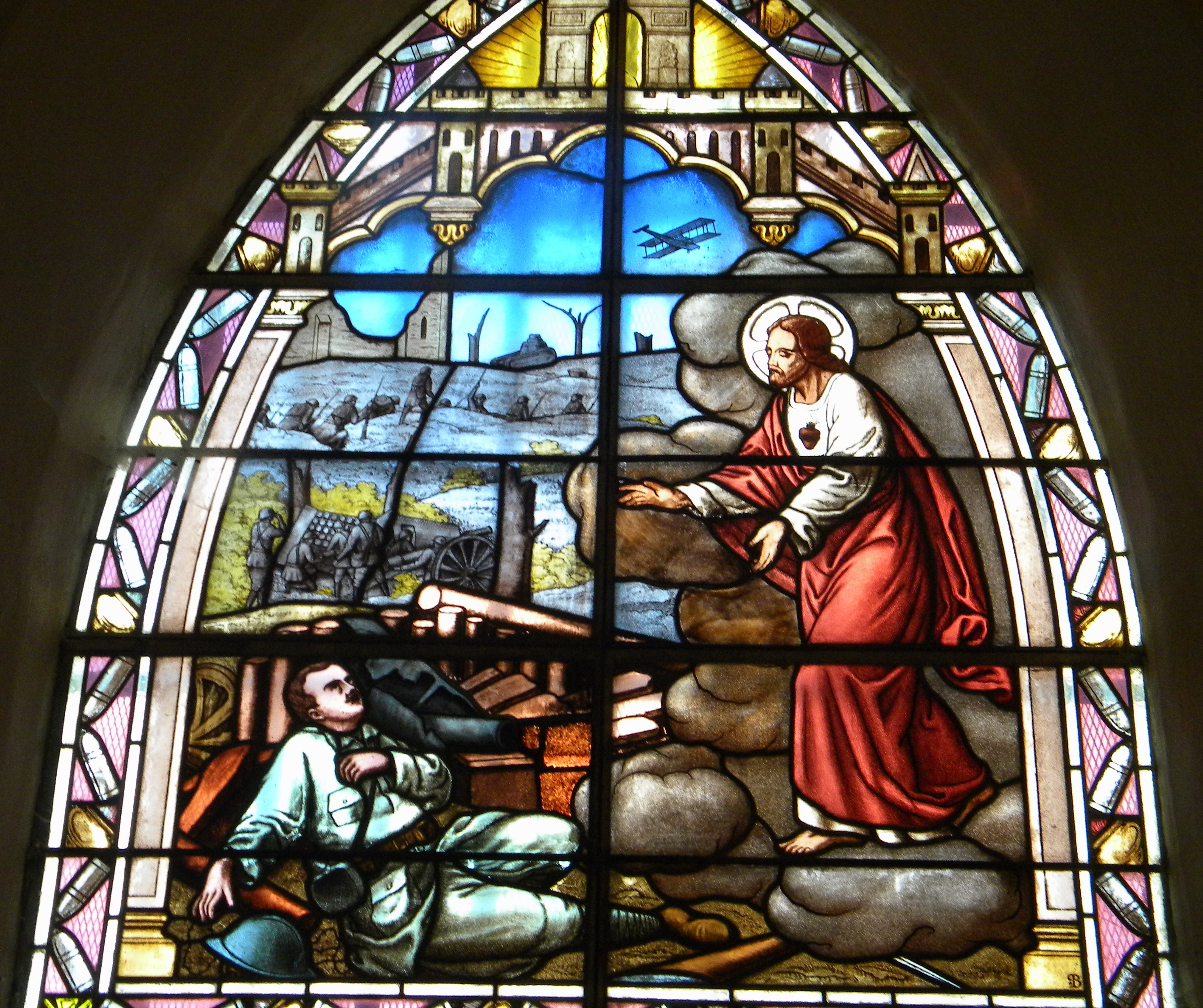 vitralo de la preĝejo de Chaudenay